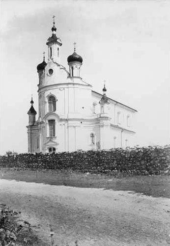 Беларуская (тарашкевіца): Лапеніца Вялікая (Грынявічы). Касьцёл пры кляштары францішканаў